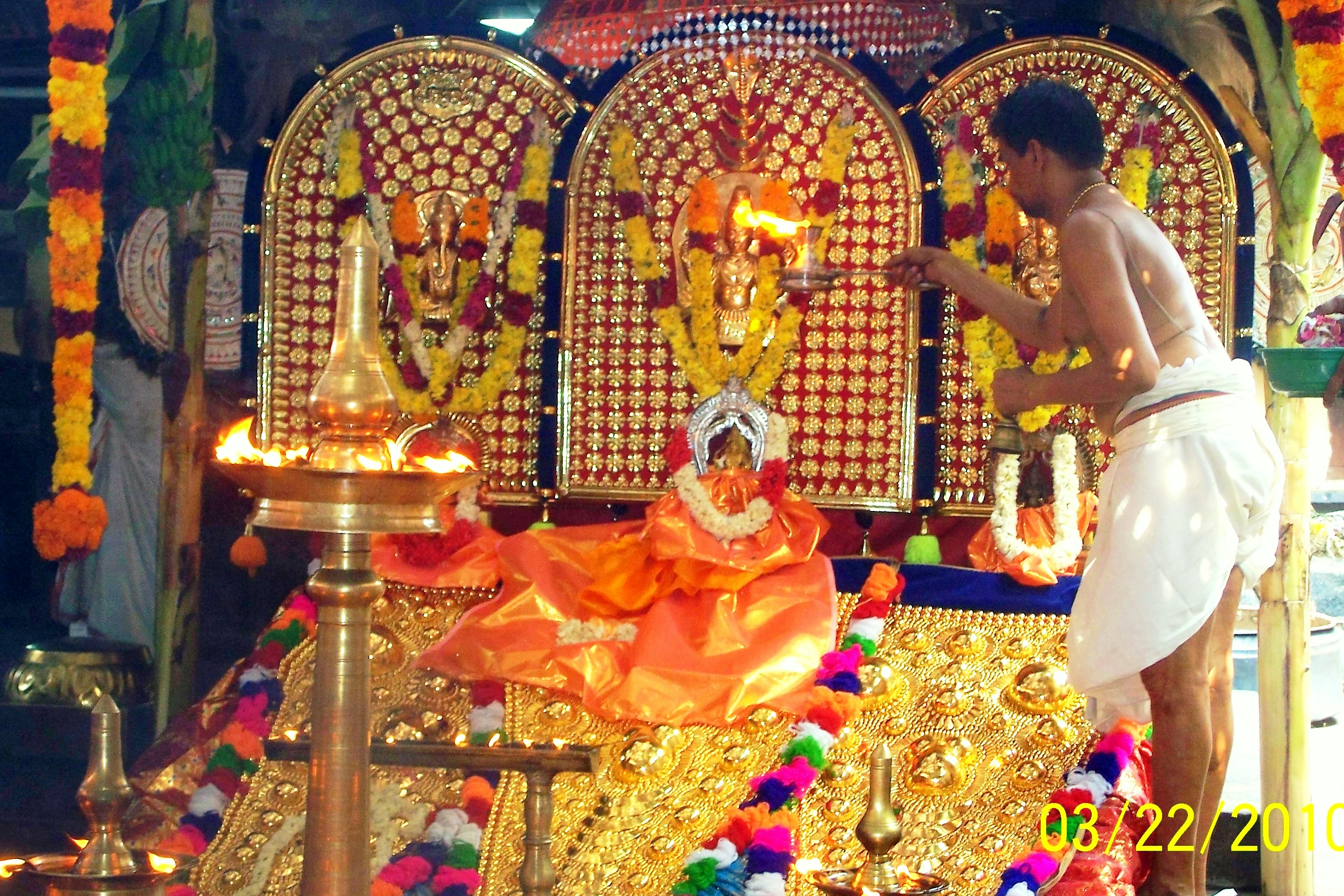 ഉത്സവബലി പൂജ; വാഴപ്പള്ളി